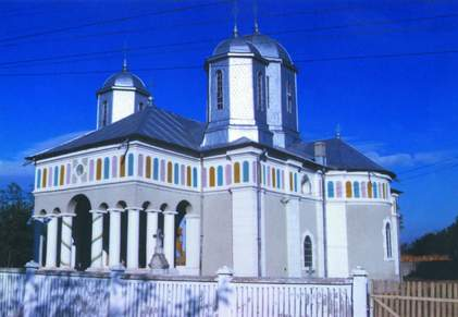 Biserica cu hramul Adormirea Maicii Domnului din satul Radomiresti